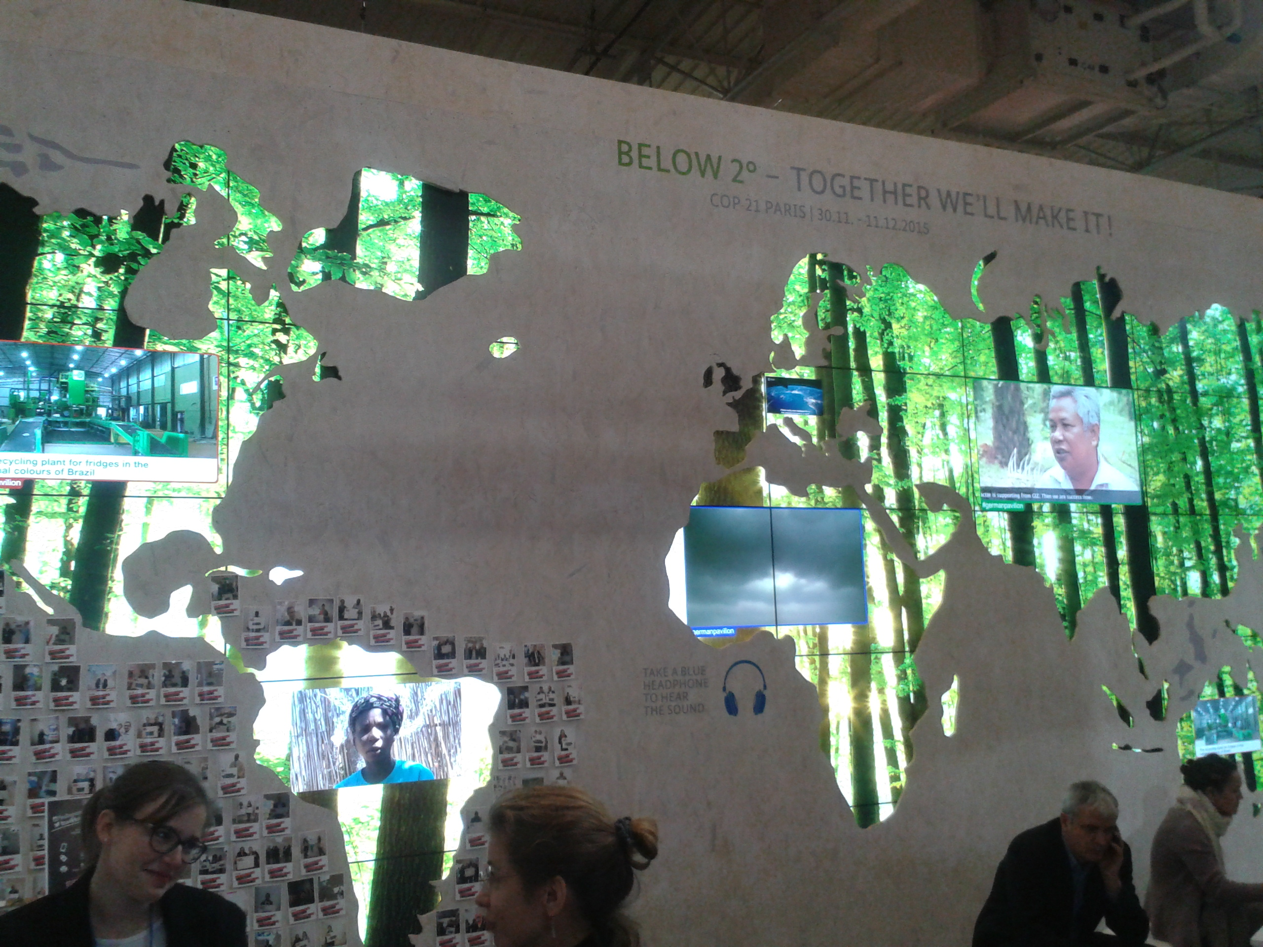 Pavillon allemand à la COP 21